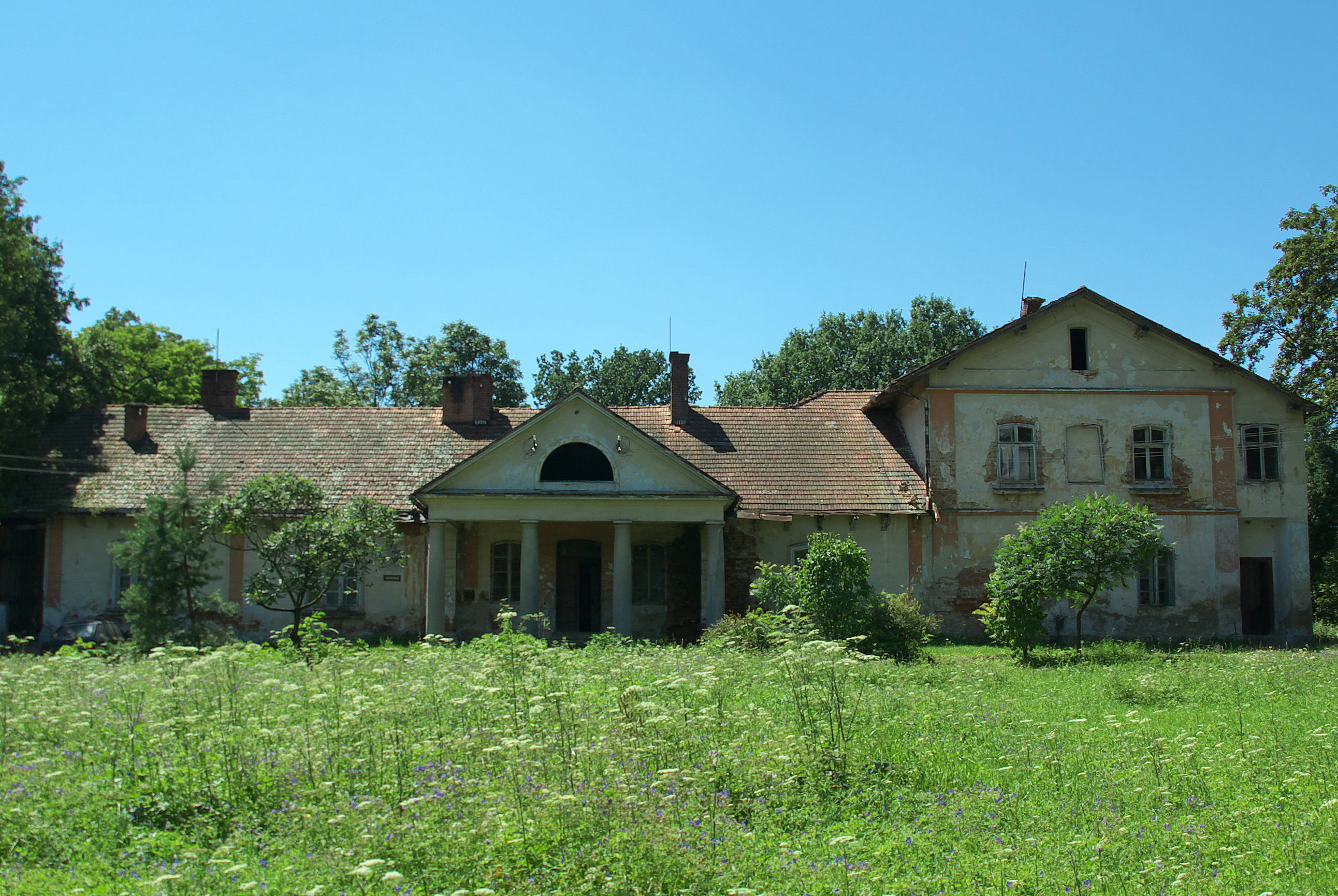 Dwór w Jurowcach (A-122 z 09.09.1988)